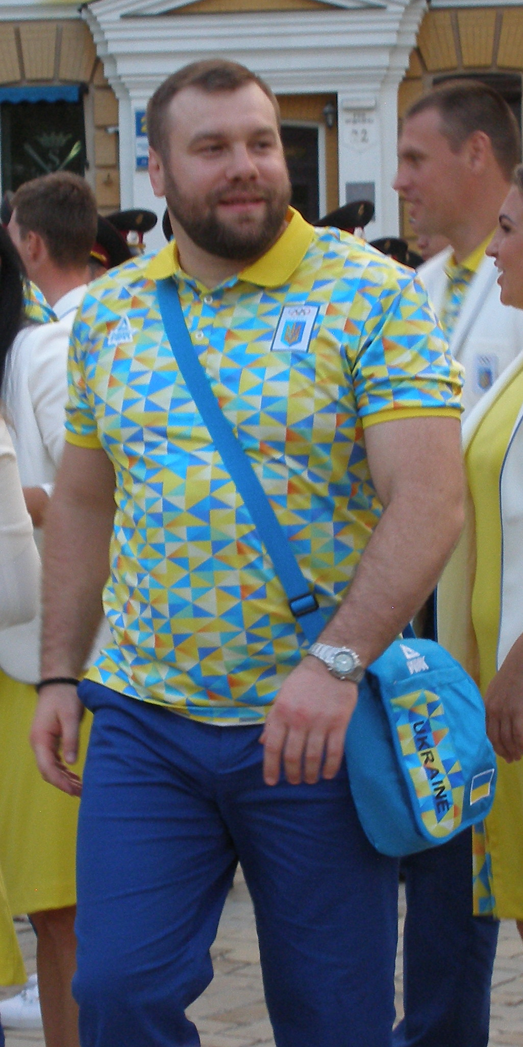 Олександр Чернецький на церемонії проводів олімпійської збірної України на Олімпіаду.